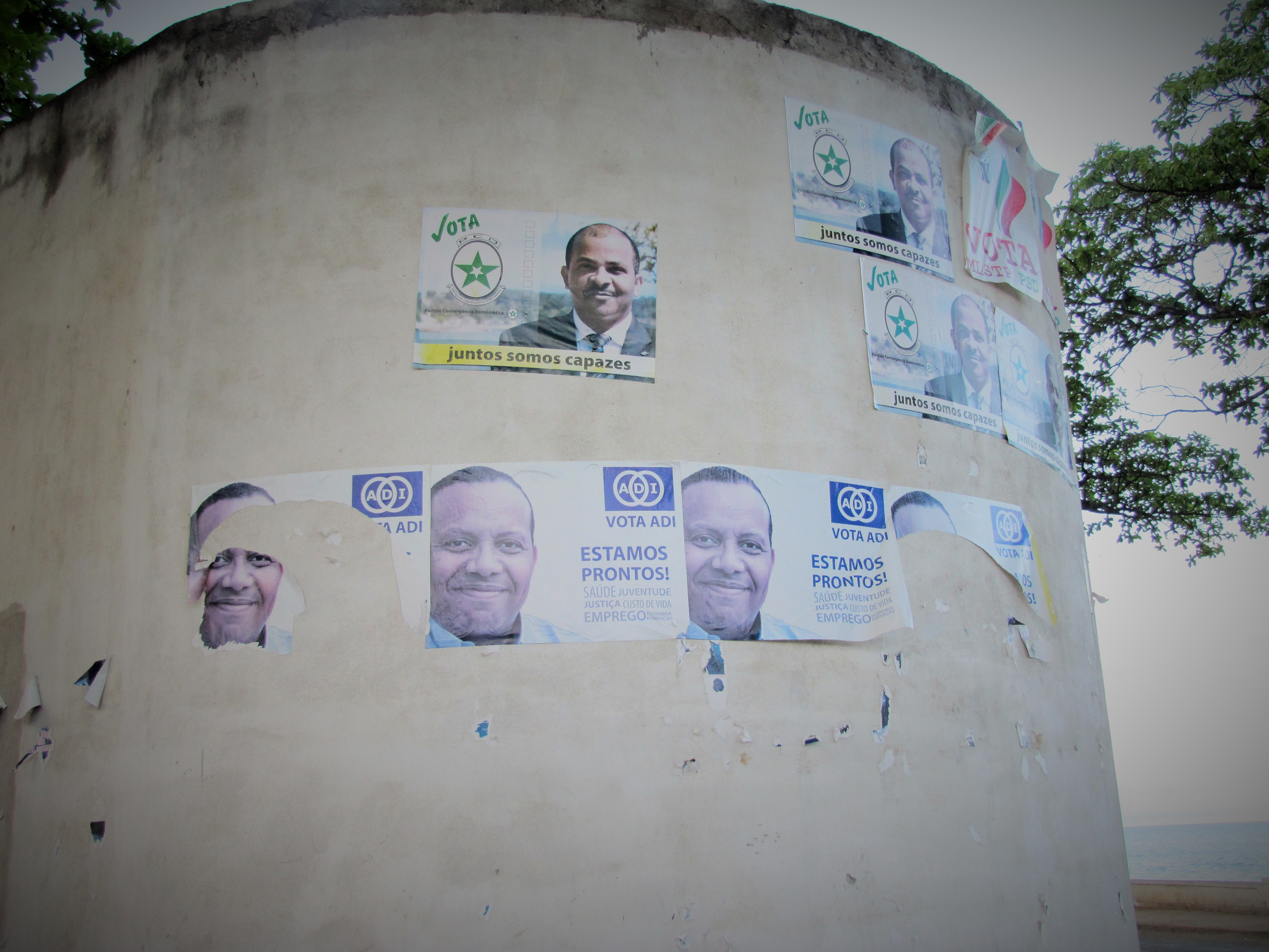 Sao Tome Campaign Posters